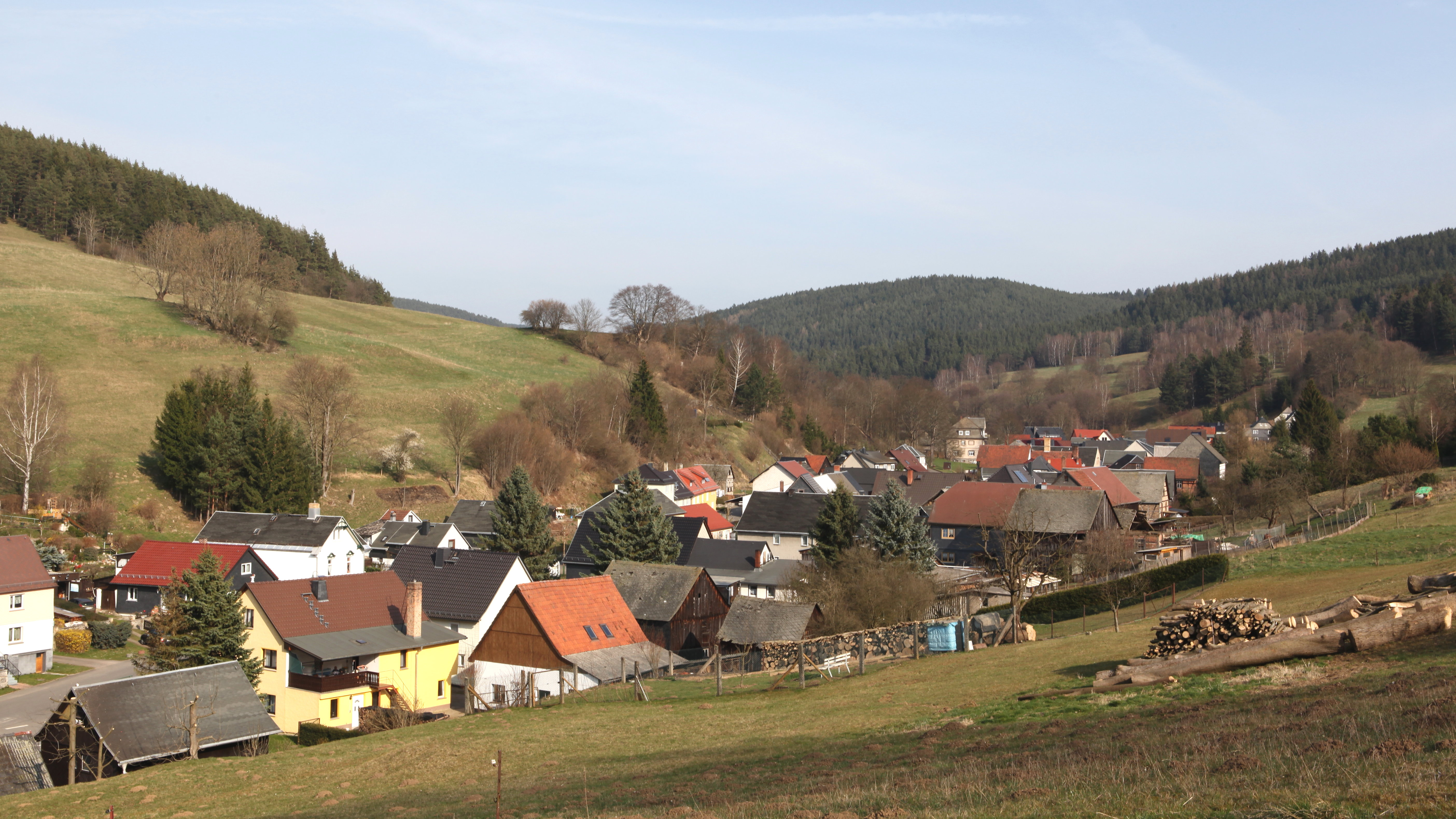 Döschnitz